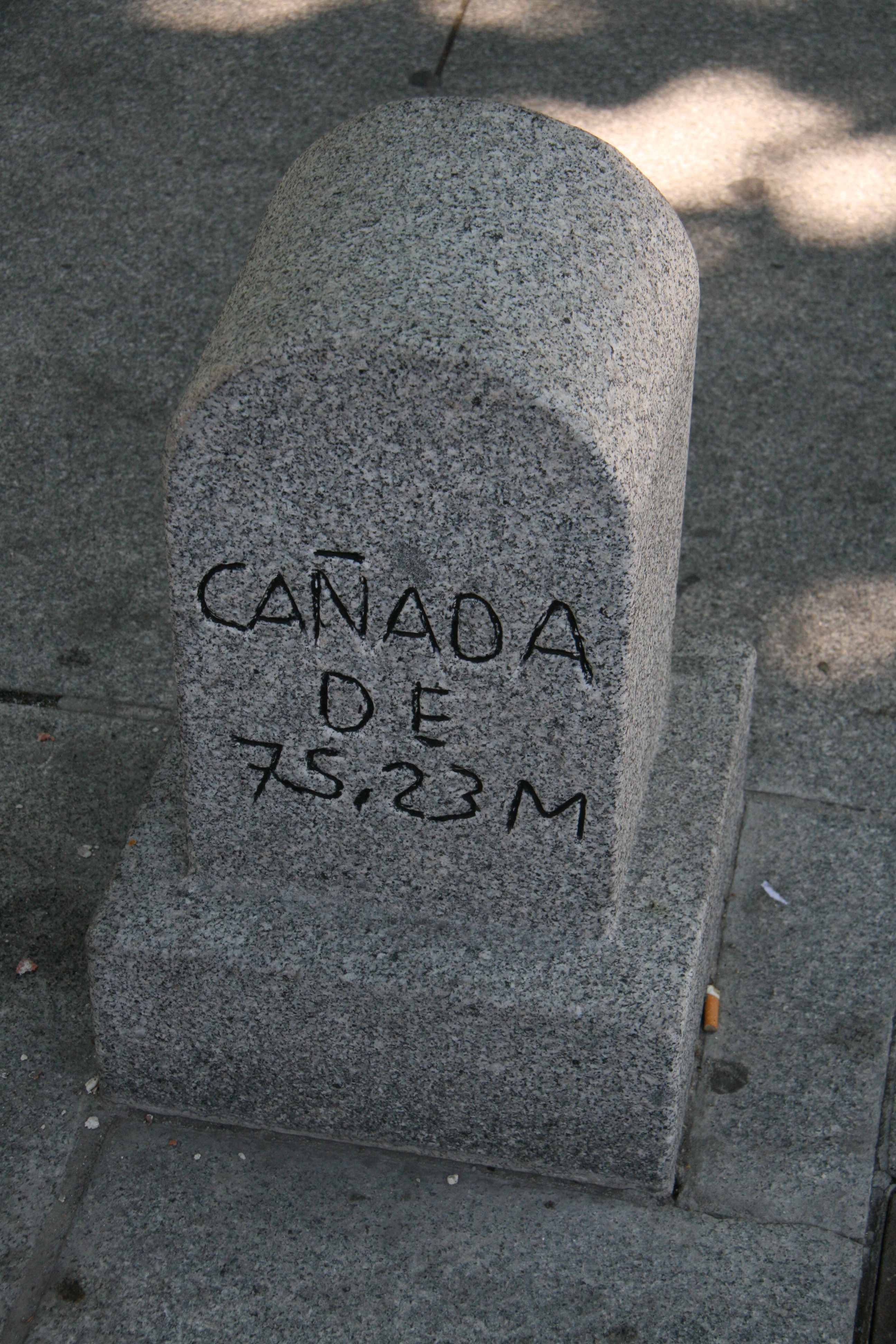 Linde de una Cañada en la Plaza de la Independencia